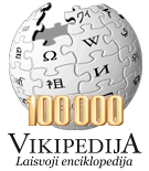 Biểu trưng 100.000 bài của Wikipedia tiếng Lithuanian